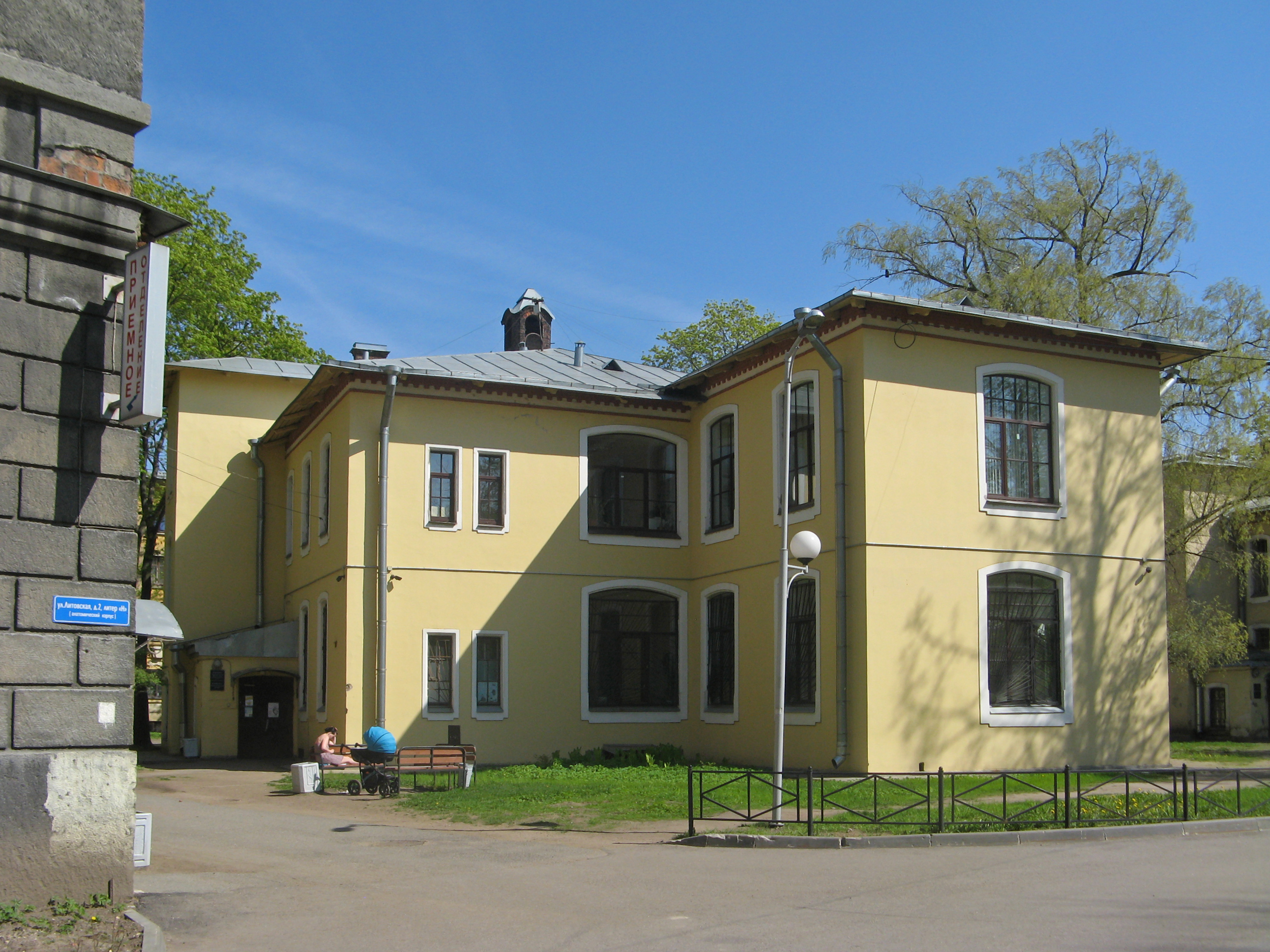 Детская больница в память Священного коронования Их Императорских Величеств. Павильон инфекционного отделения: Литовская улица, 2 литера М, Выборгский район, Санкт-Петербург